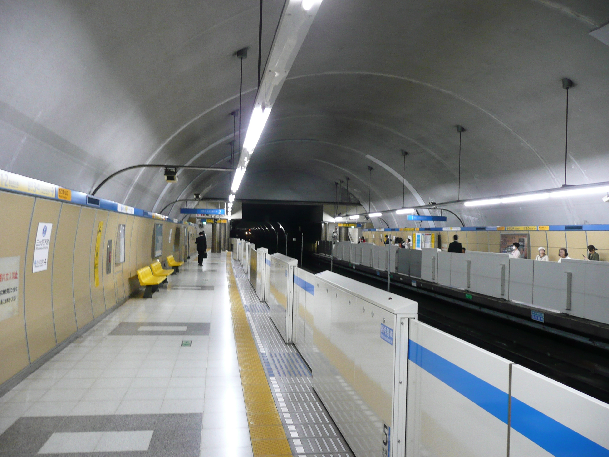 三ツ沢下町駅ホーム